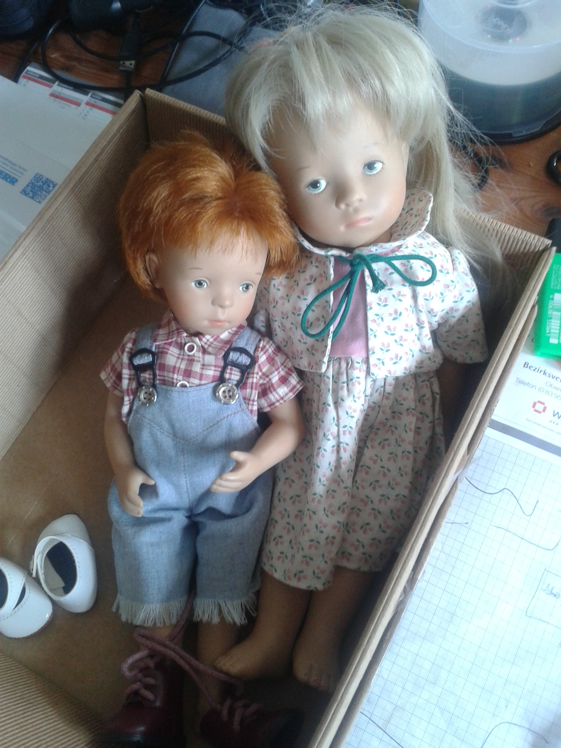 Sylvia Natterer Dolls